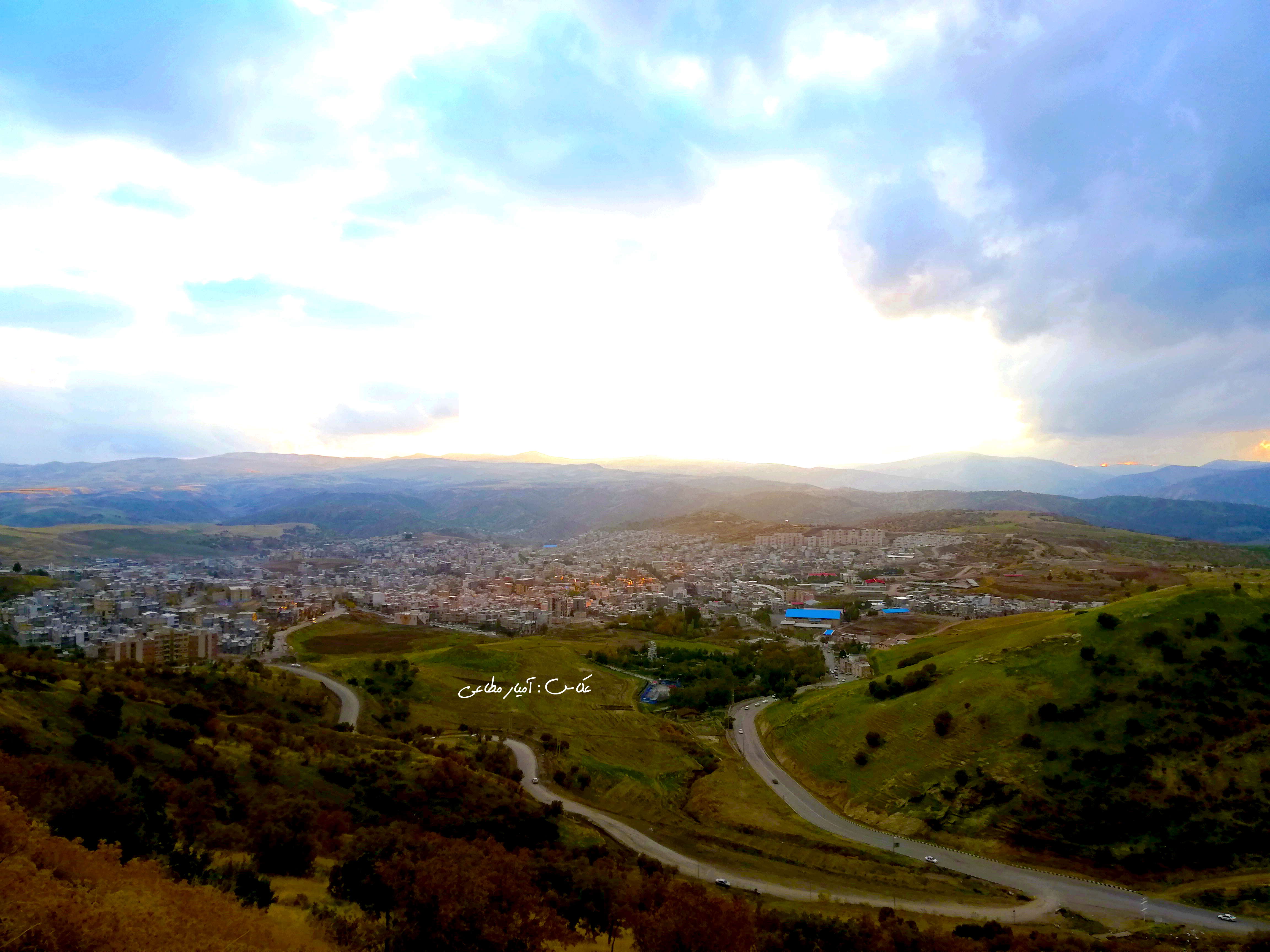 جوانرود